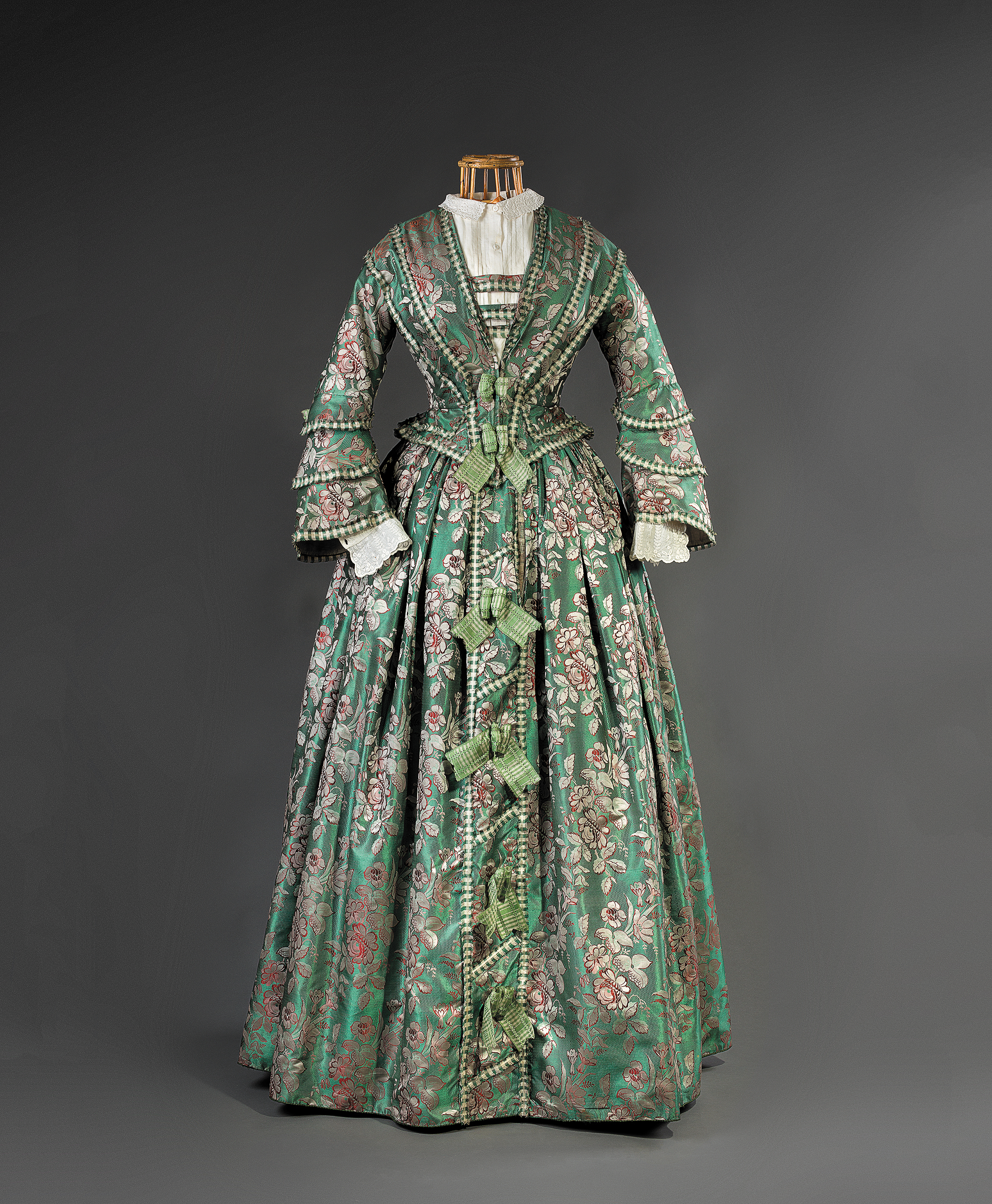 Dvoudílné hedvábné šaty, Praha, kolem r. 1850, Uměleckoprůmyslové muzeum v Praze